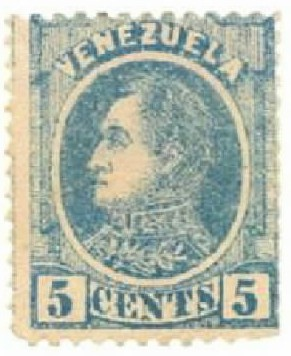 Efigie de Simón Bolívar del año 1880 primera estampilla postal cin la efigie de libertador y primera perforada. Grabadas por Marcos diversos, perforacion 12. Nª de catálogo * según Aurelio Blanco: 35 Blanco, Aurelio. 2009: Venezuela Catálogo especializado de estampillas. Caracas. 183p. ISBN 980-300-176-0